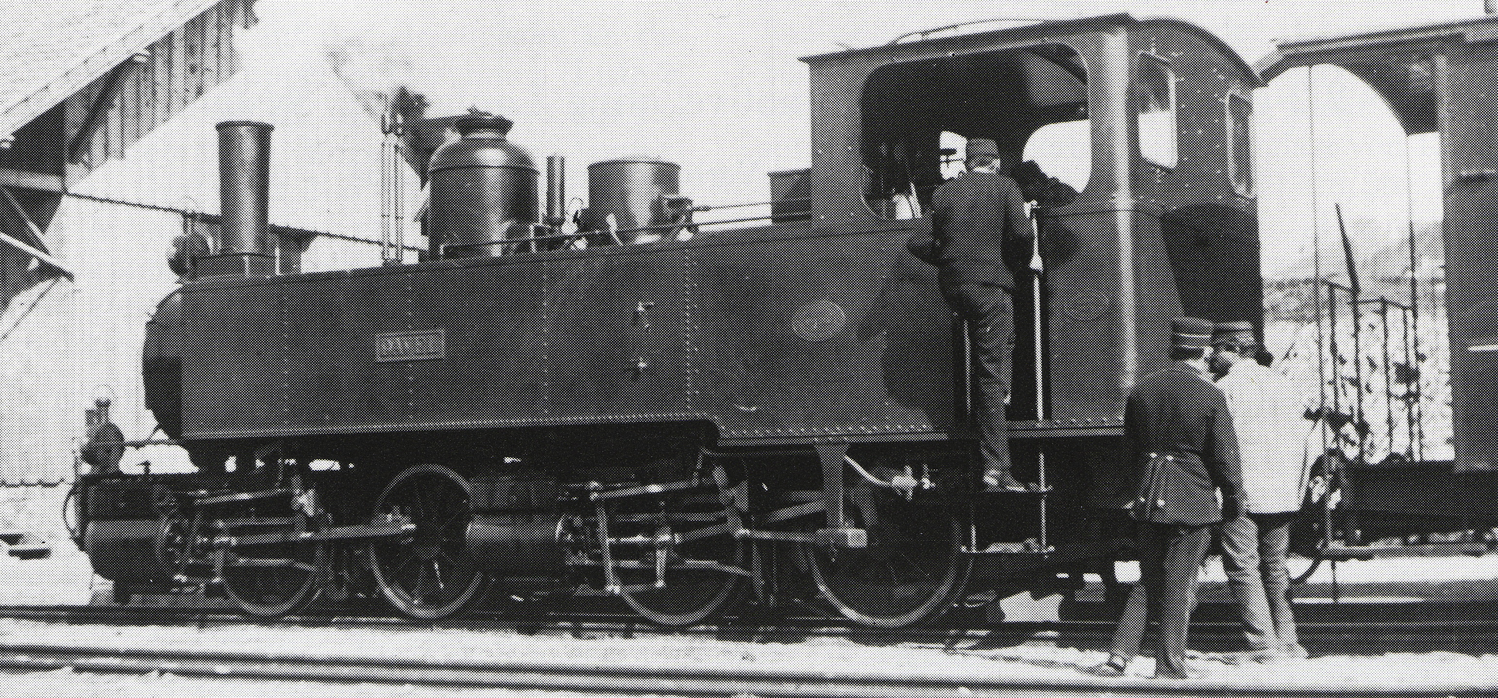 Dampflocomotive G 2×2/2 Nr. 3 Davel der Ifferten—Heilig Kreuz-Bahn, gebaut 1893 zů Grafenſtaden von der Elſäſſiſchen Machines-Baugeſellſchaft (Fabr.-Nr. 4518), 1906 mit neuem Keſſel und 1915 mit Überhitzer ausgeſtattet, 1921 an die Lauſanne–Echallens–Bercher-Bahn, 1937 außer Dienſt geſtellt und anſchließend abgebrochen.